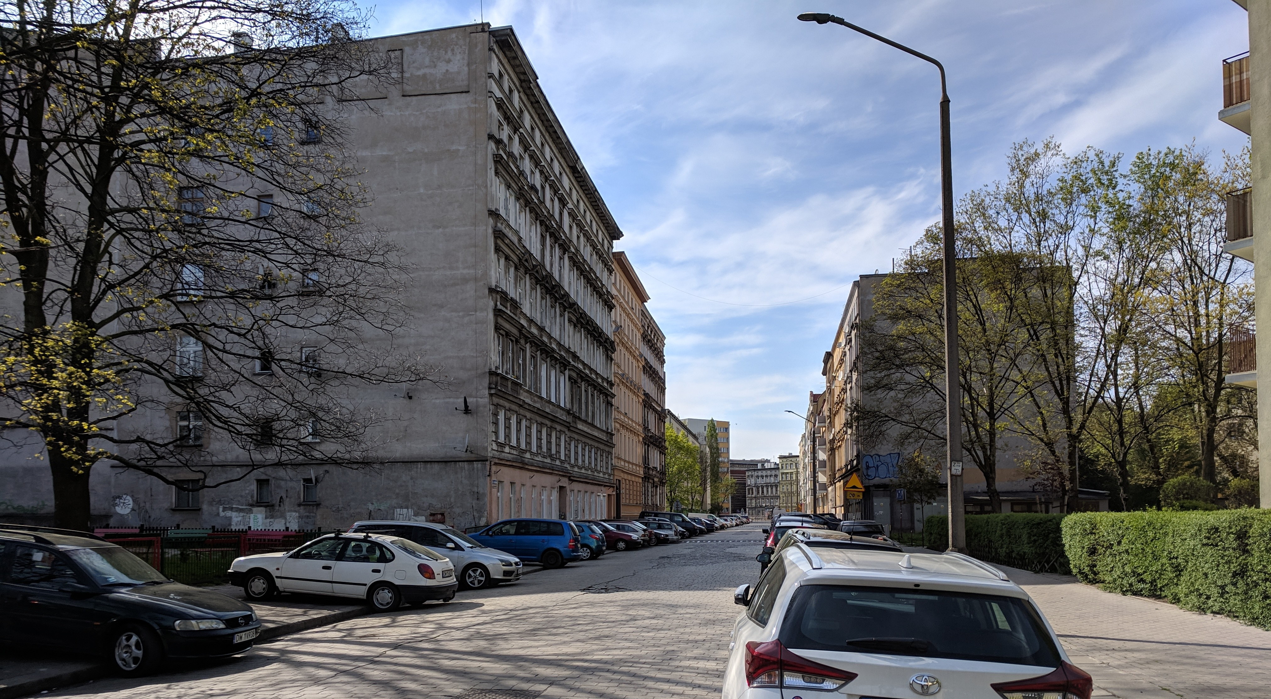 ulica Jęczmienna we Wrocławiu, widok od Grabiszyńskiej do placu Rozjezdnego